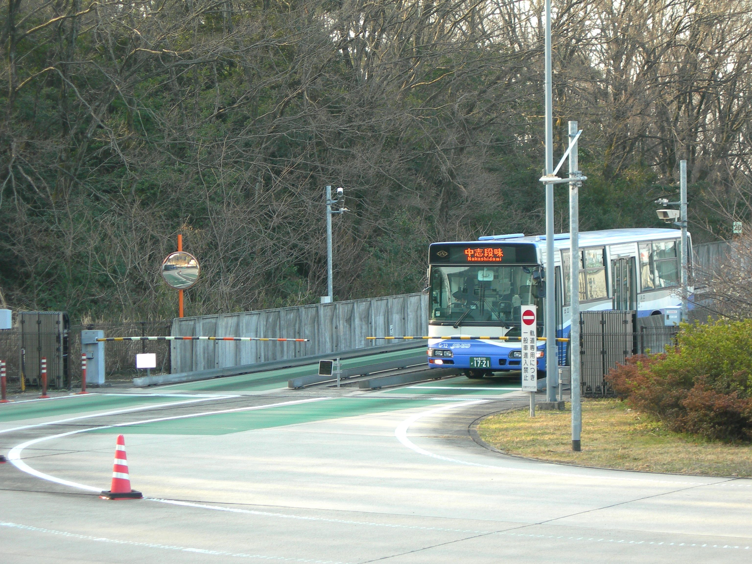 ゆとりーとライン・専用区間出入口